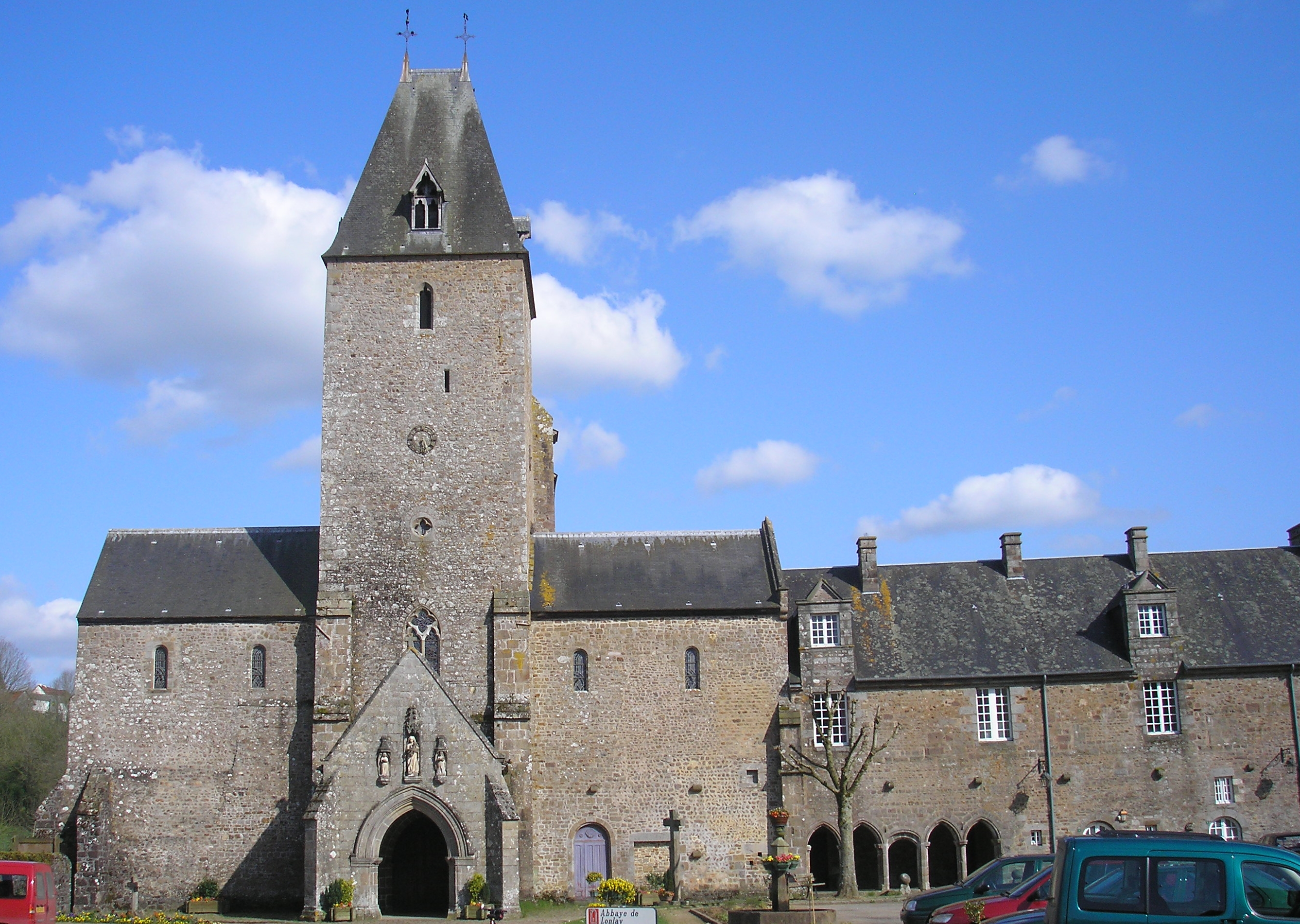 Lonlay-l'Abbaye (Normandie, France). La façade de l'abbaye.